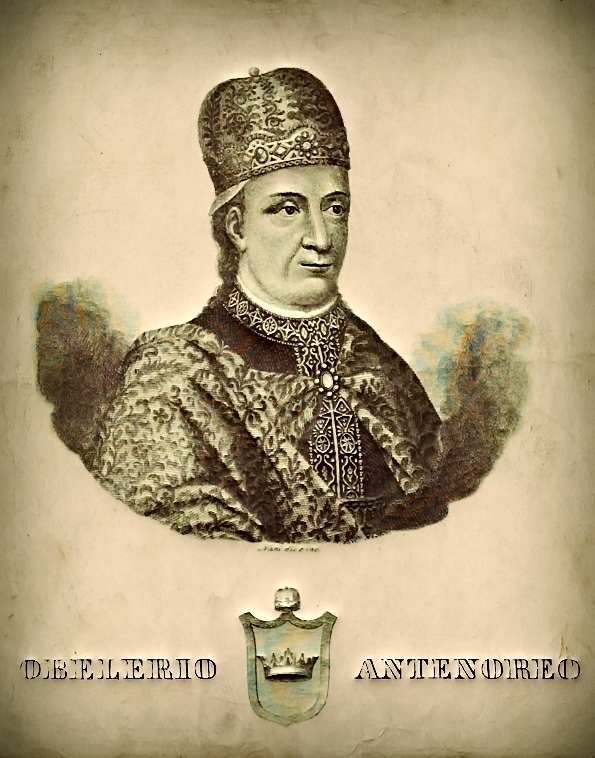 Обелеріо Антенорео, 9-й дож Венеції